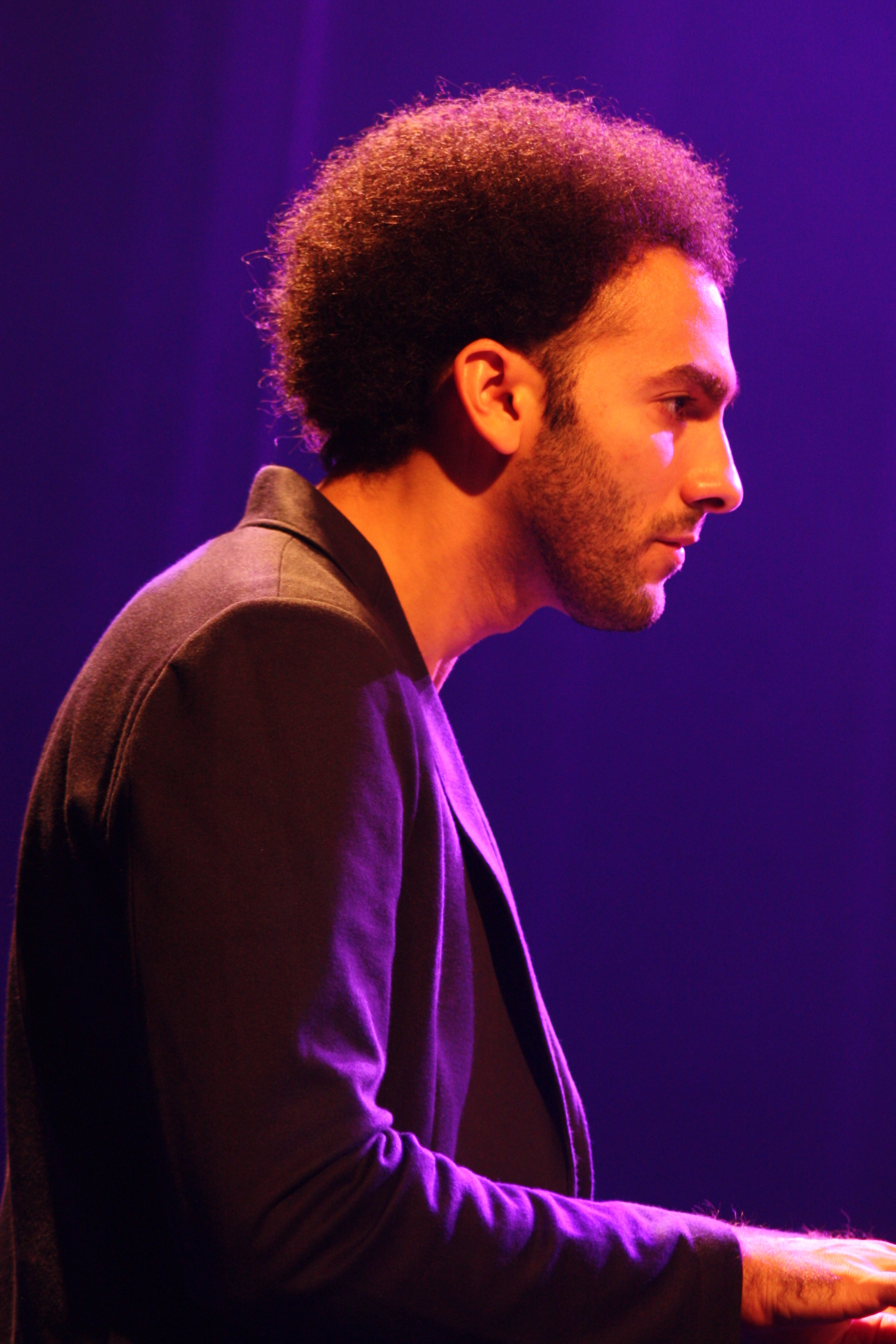 44. Deutsches Jazzfestival Frankfurt 2013: David Vireilles